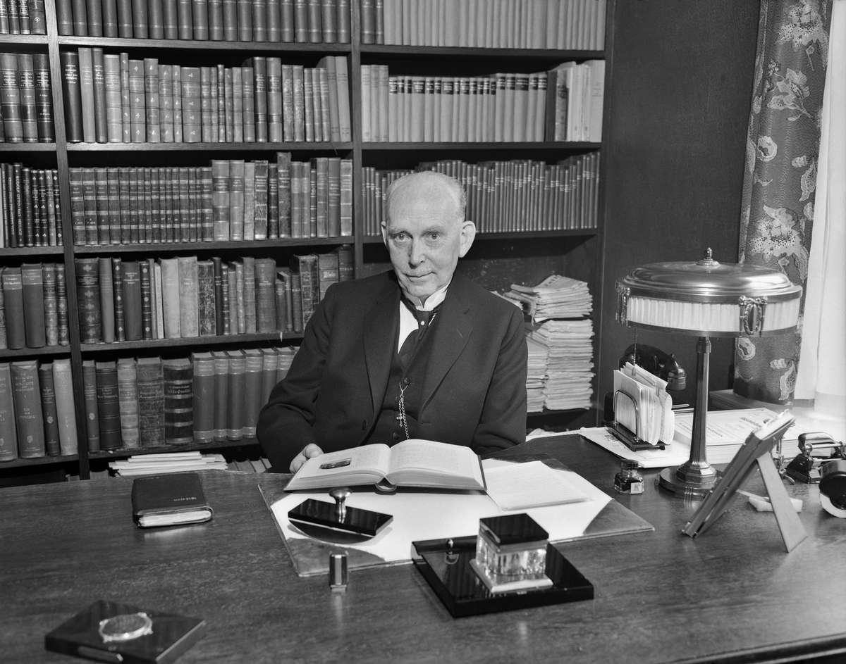 Hjemme hos teologen Ole Hallesby.